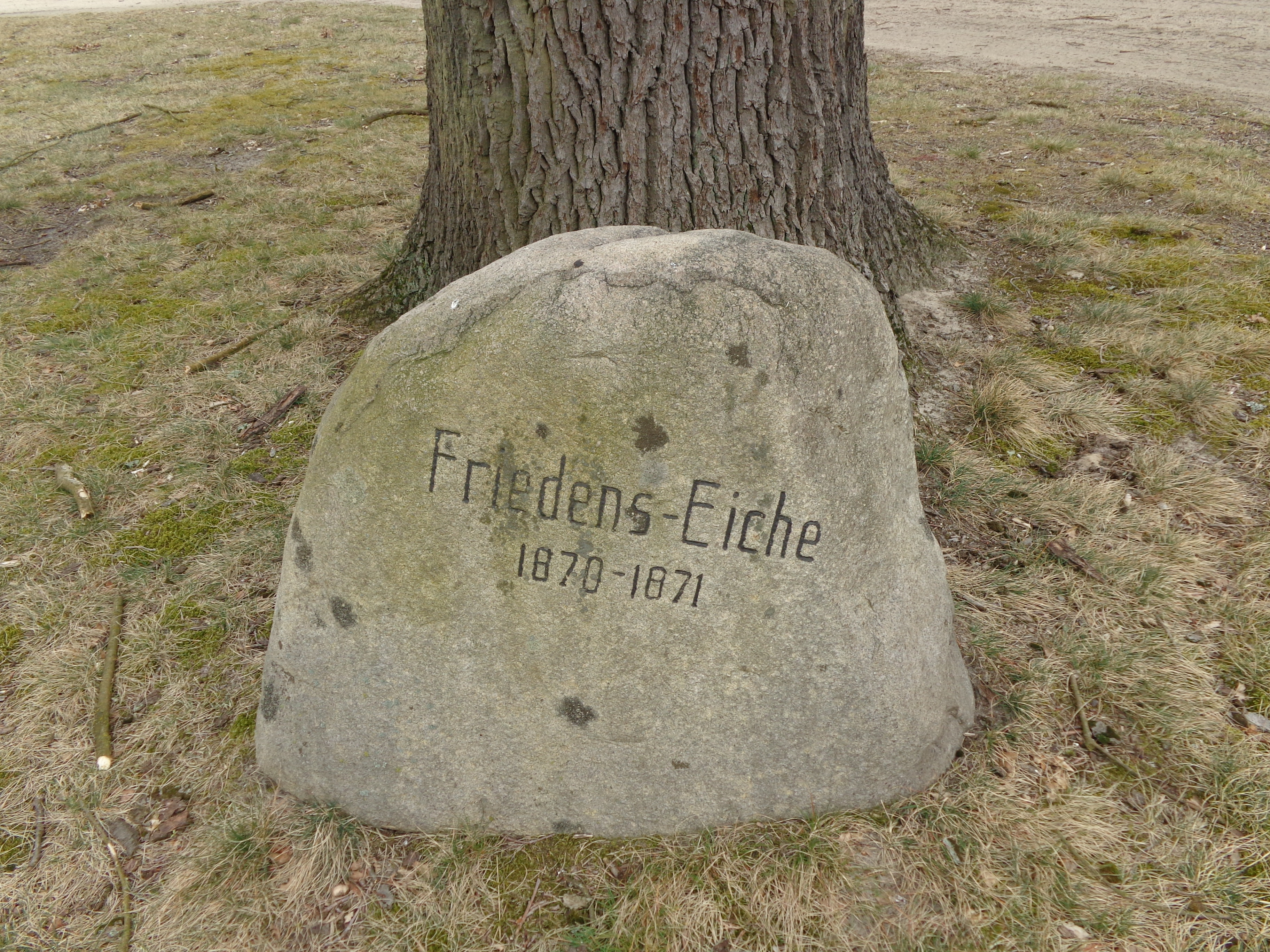 Friedenseiche auf dem Dorfplatz, Plattkow, Ortsteil der Gemeinde Märkische Heide, Landkreis Dahme-Spreewald, Brandenburg, Deutschland